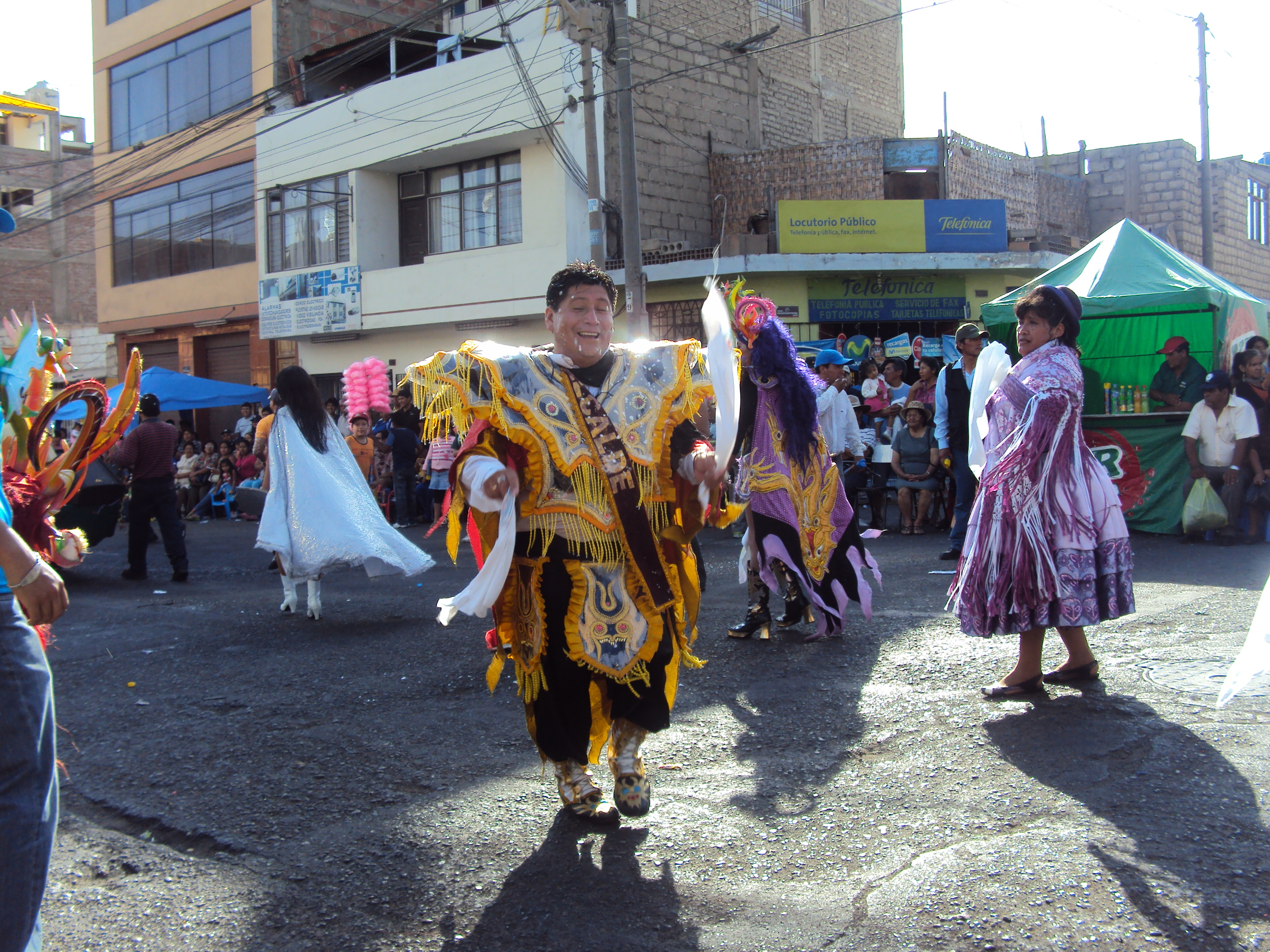 Carnaval Internacional de Tacna